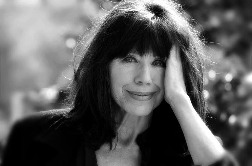 Kiss Mari (Bükkaranyos, 1952. október 9. –) Jászai Mari-díjas magyar színésznő.